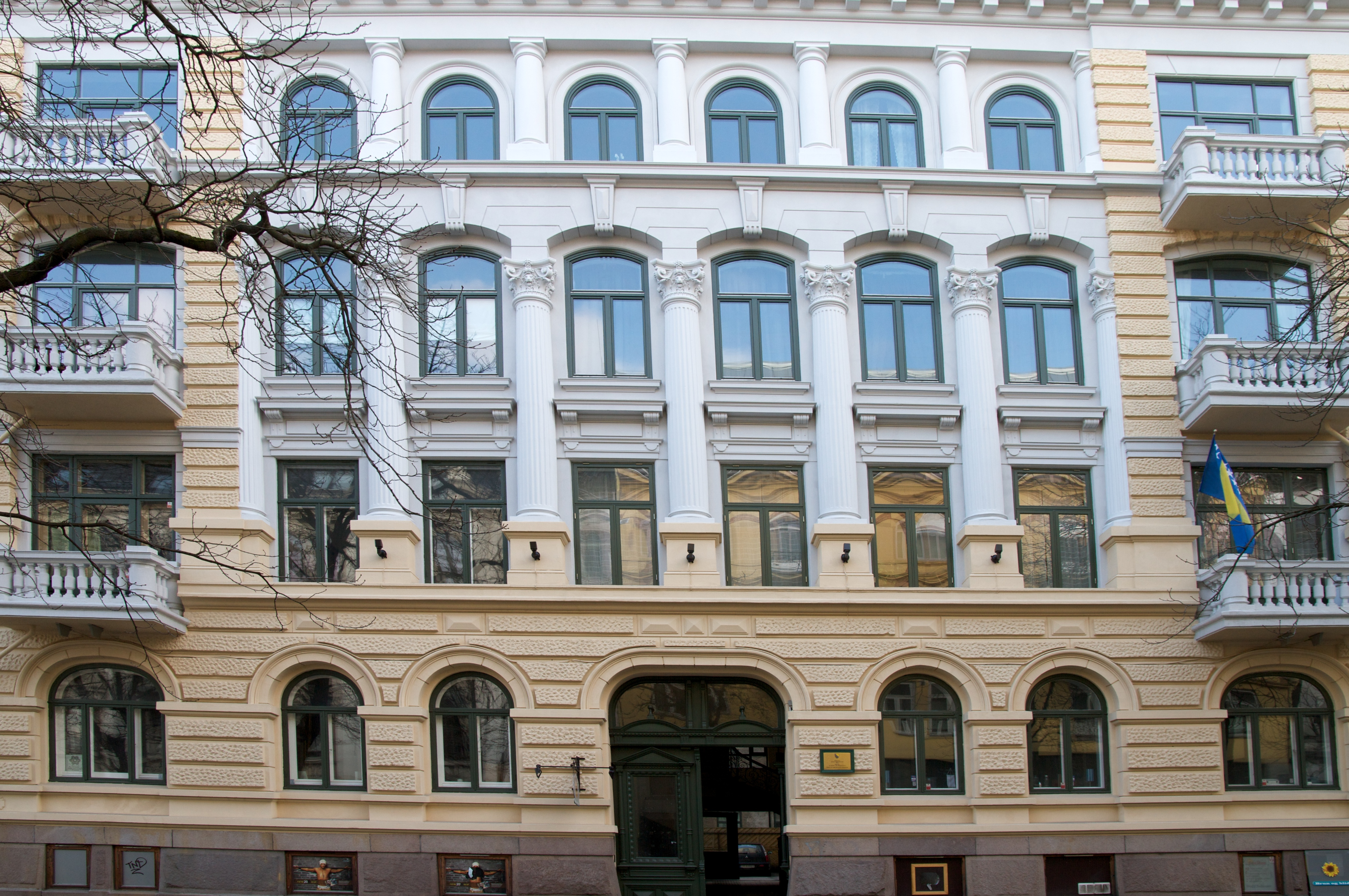 Bygdøy allé 10. Frogner i Oslo.